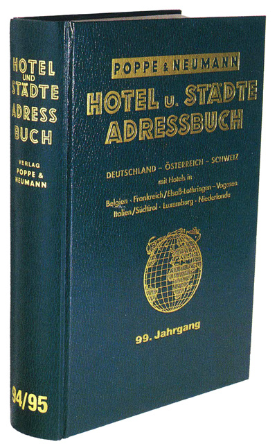 Foto des Buches „Hotel u. Städte Adressbuch“, 99. Jahrgang